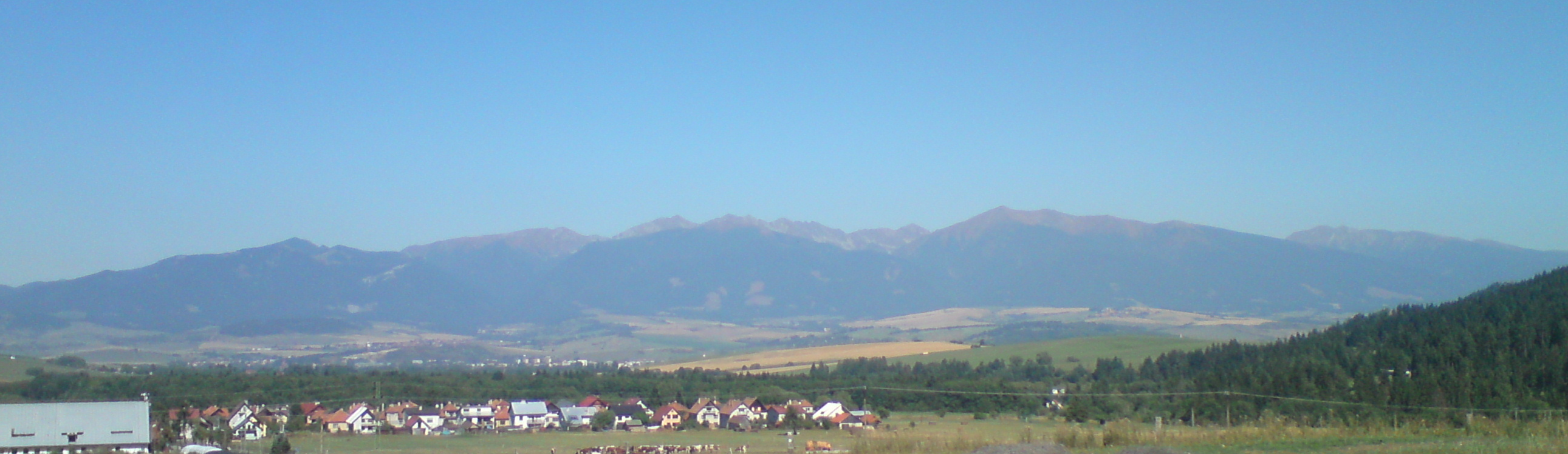 Západné Tatry od Demänovej